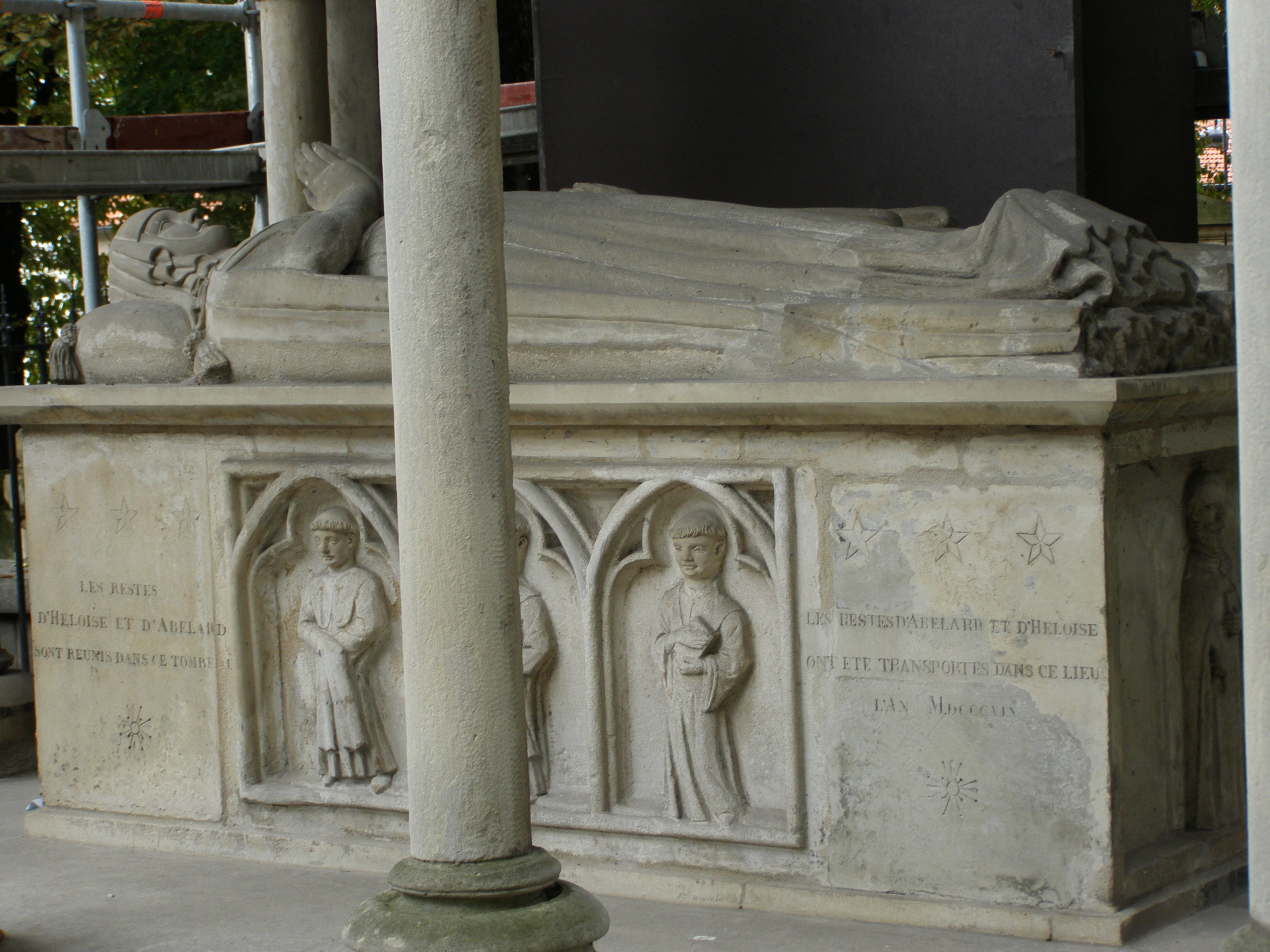 Tombe d'Alélard et d'Héloïse, Paris, Cimetière du Père-Lachaise avec les inscriptions: Les restes d'Héloïse et d'Abélard sont réunis dans ce tombeaux - Les restes d'Abélard et d'Héloïse ont été transportés dans ce lieu en l'an MDCCCXIX.